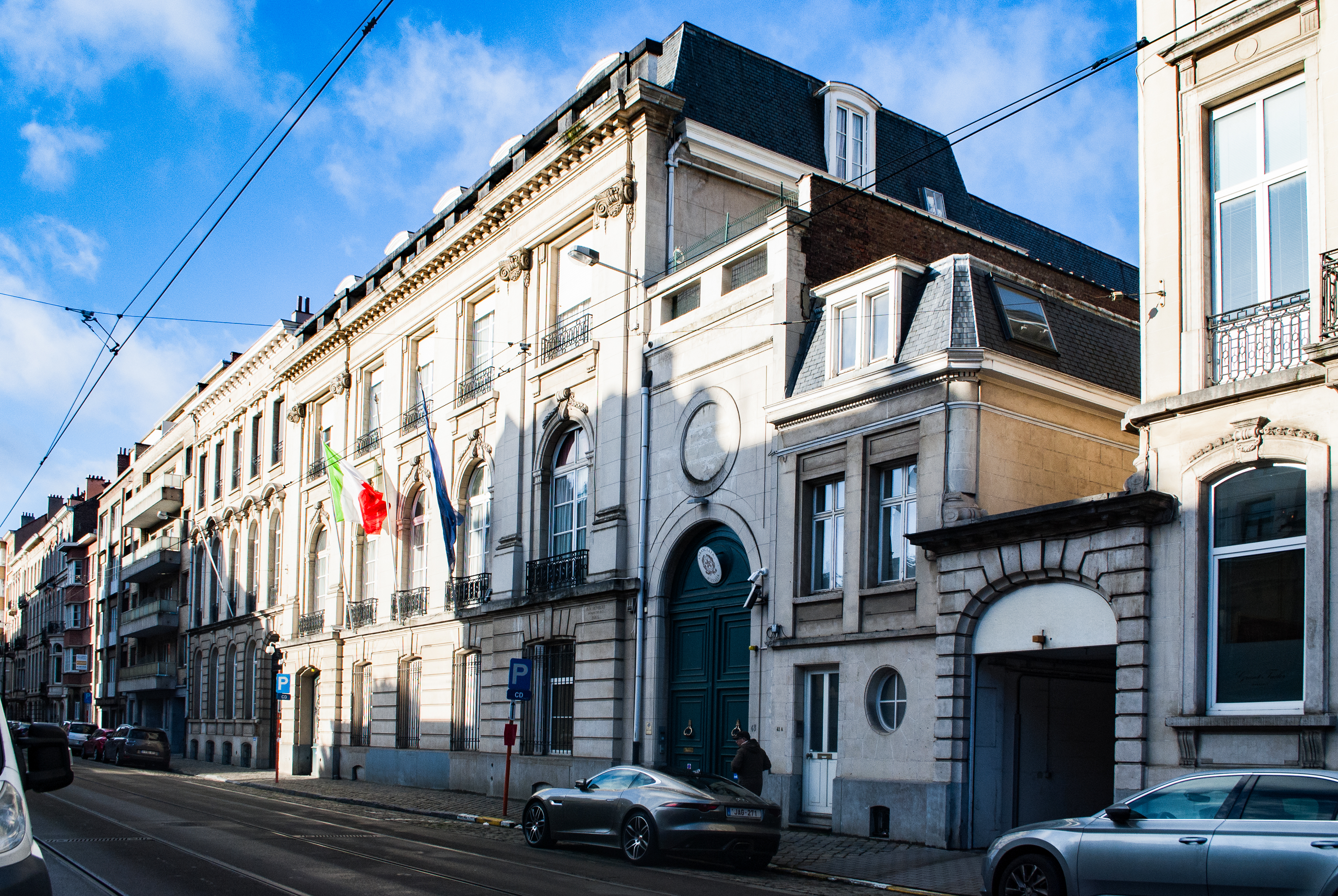 Consulat d'Italie, Rue de Livourne 38, Ixelles